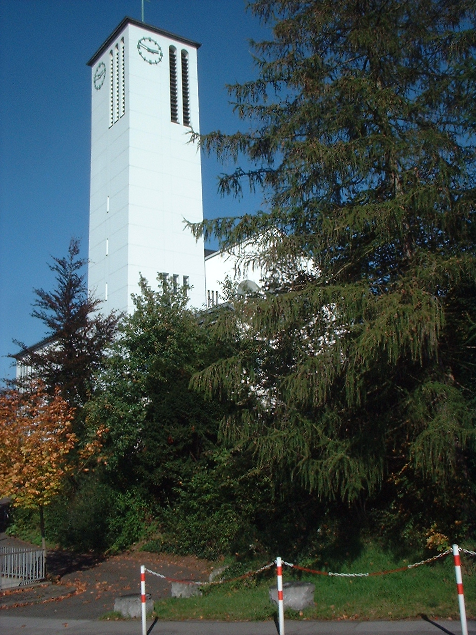 Piuskirche